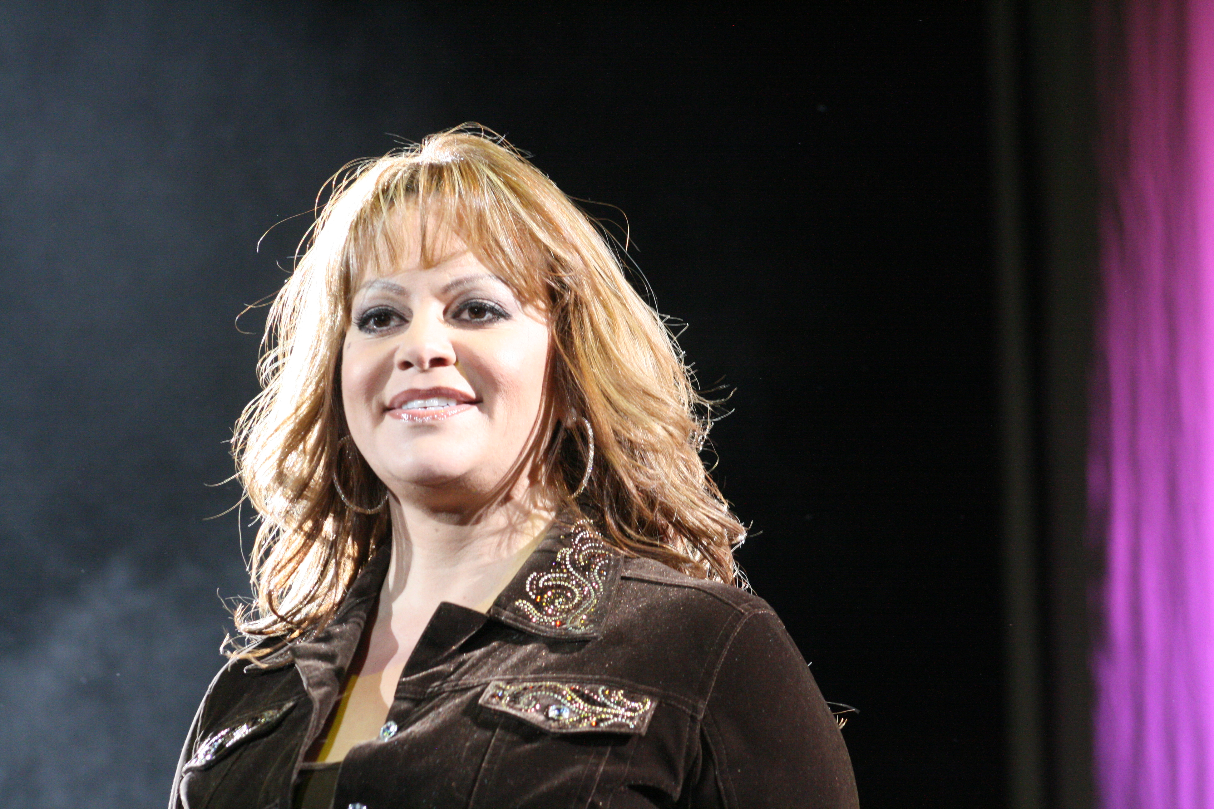 Jenni Rivera en el Pepsi Center (08.22.09)